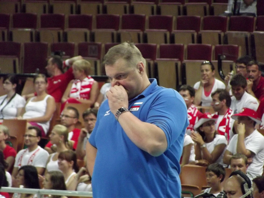 Zdjęcie zrobione podczas pierwszego dnia IX Memoriału im. Wagnera w katowickim Spodku.